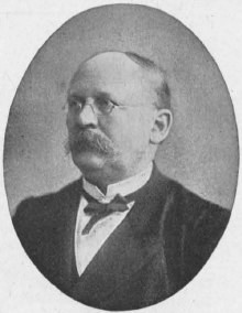 Professoren der medizinischen Fakultät der Universität Berlin: Adolf Gusserow